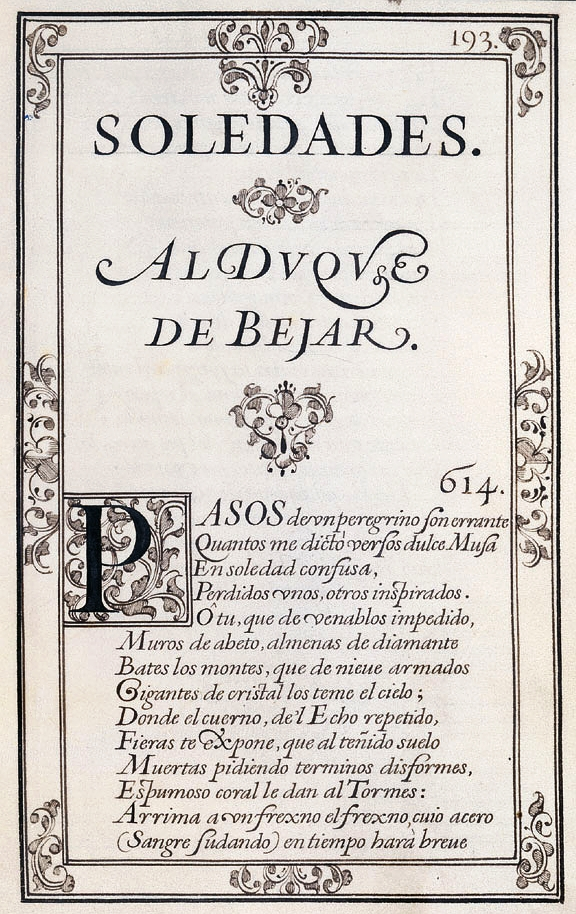 Página inicial de las Soledades en el Manuscrito Chacón de las obras de Luis de Góngora (l. I, pág. 193)